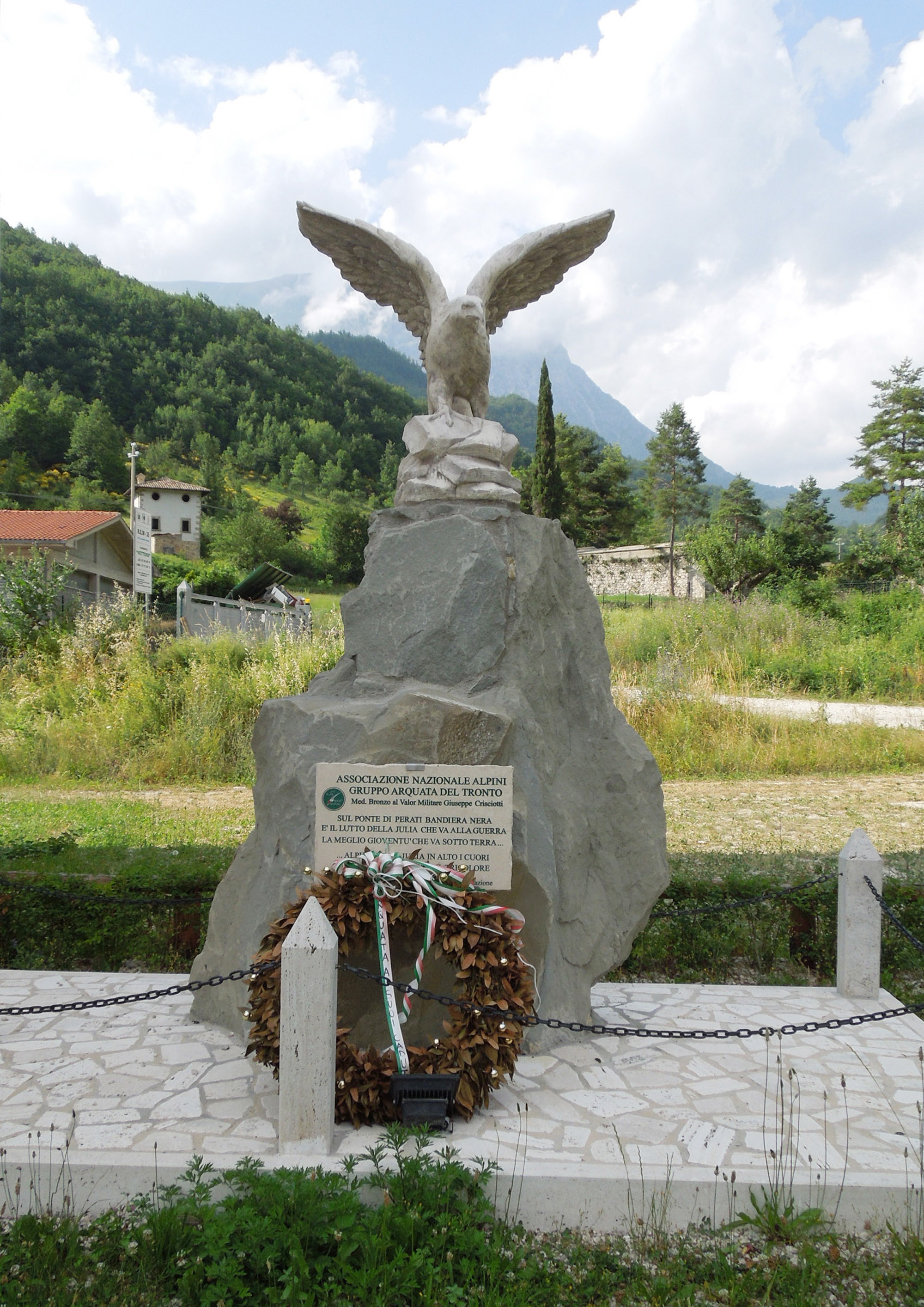 Monumento agli Alpini, collocato presso la sede del Gruppo Alpini di Arquata del Tronto Giuseppe Crisciotti, in provincia di Ascoli Piceno.